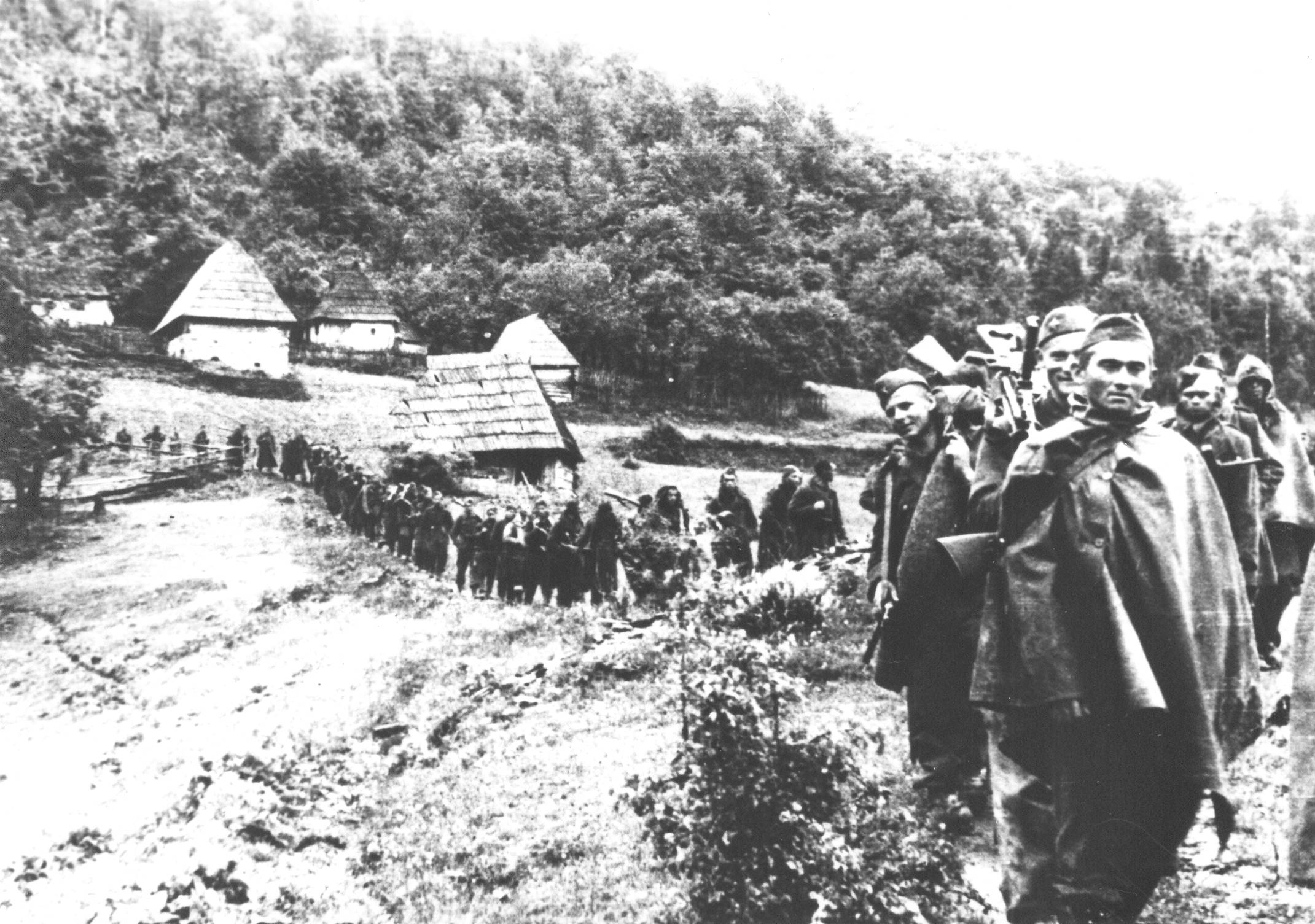 Srpskohrvatski / српскохрватски: Prateći bataljon Vrhovnog štaba, posle Desanta na Drvar, prolazi kroz selo Šćit na putu za Foču, juna 1944.